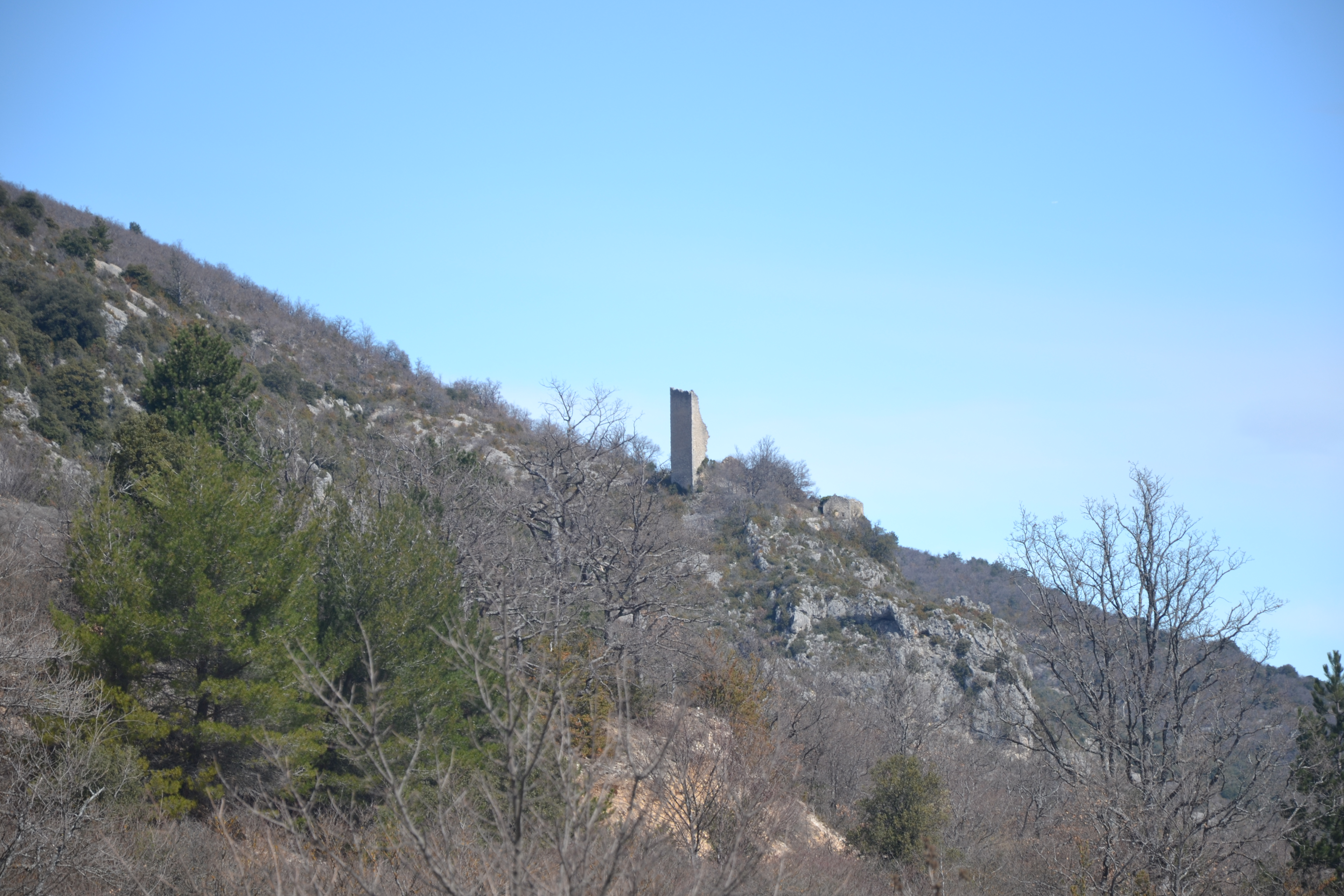 Tour de Guet, au dessus du village de Monieux